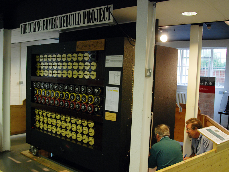 Naukowcy odtwarzają bombę kryptologiczną Turinga